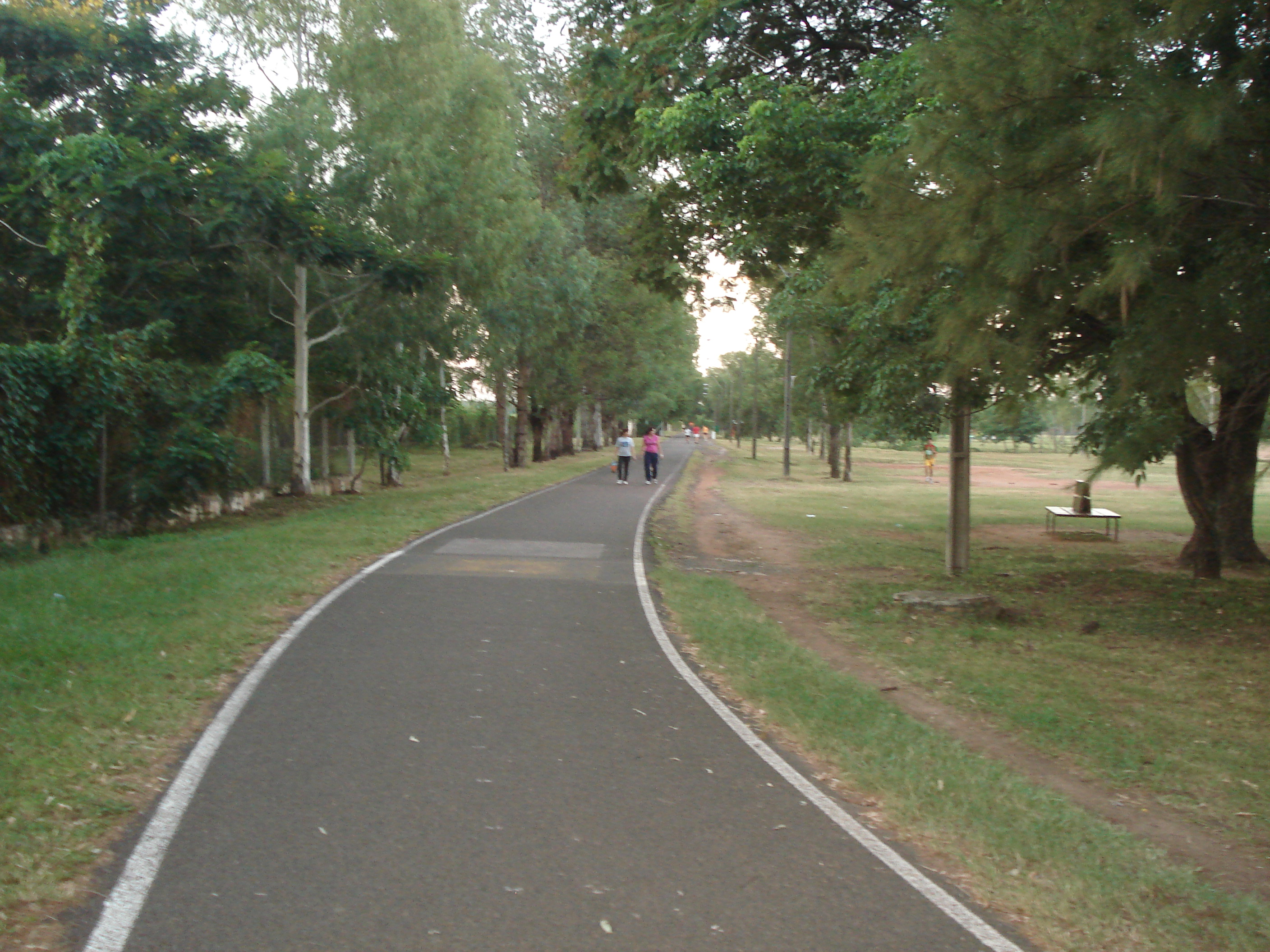 Ñu Guasu Circuito